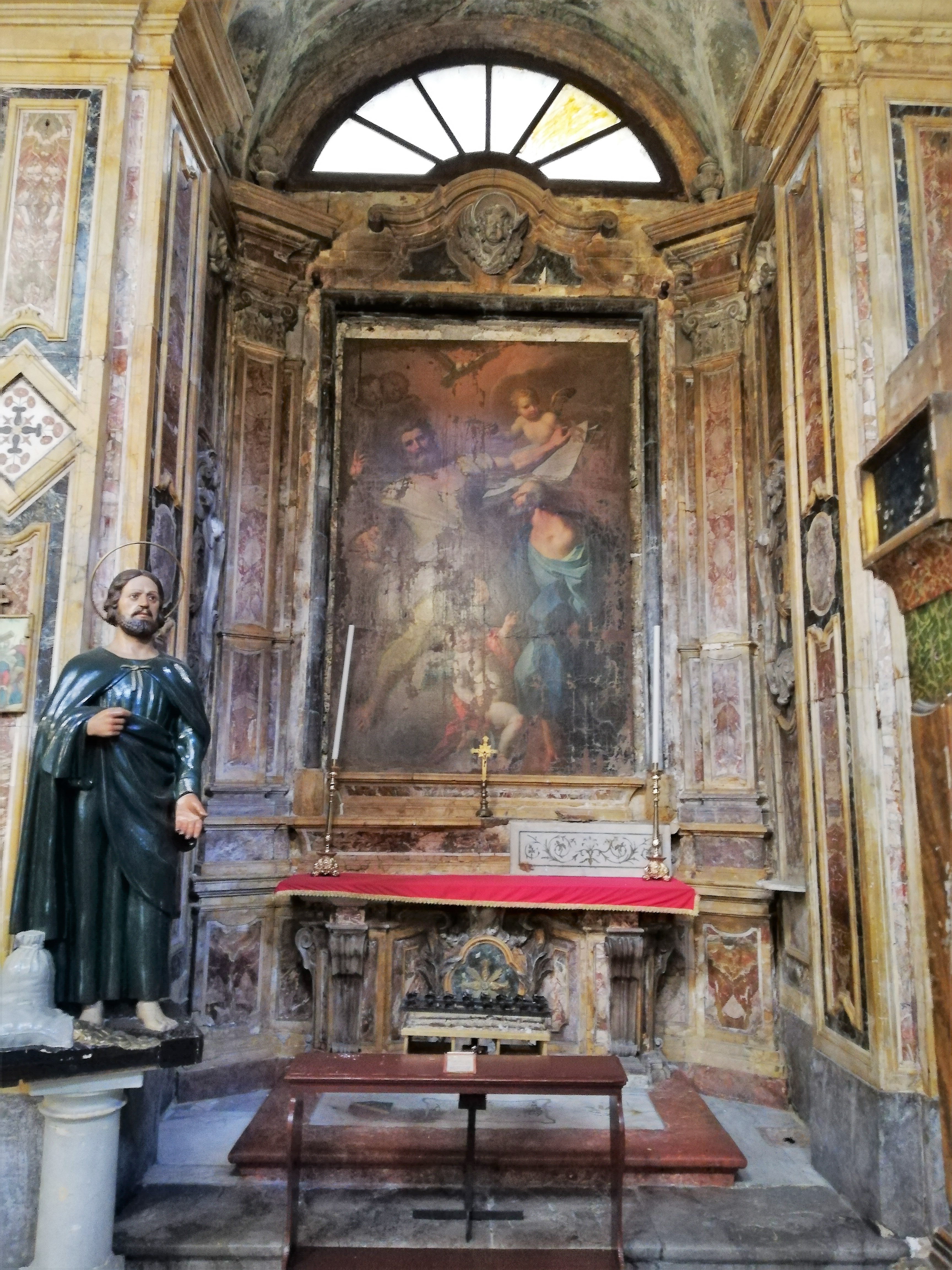 Quinta cappella sinistra.